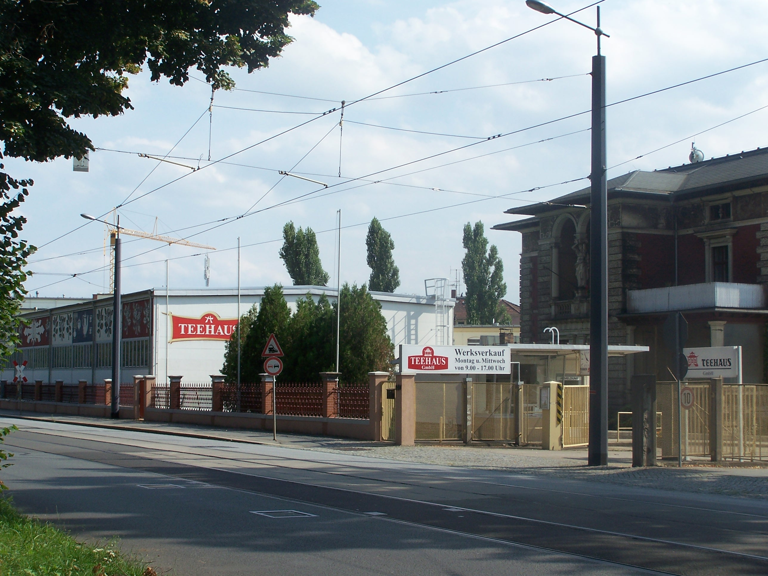 Teekanne-/Teehausstandort in Radebeul